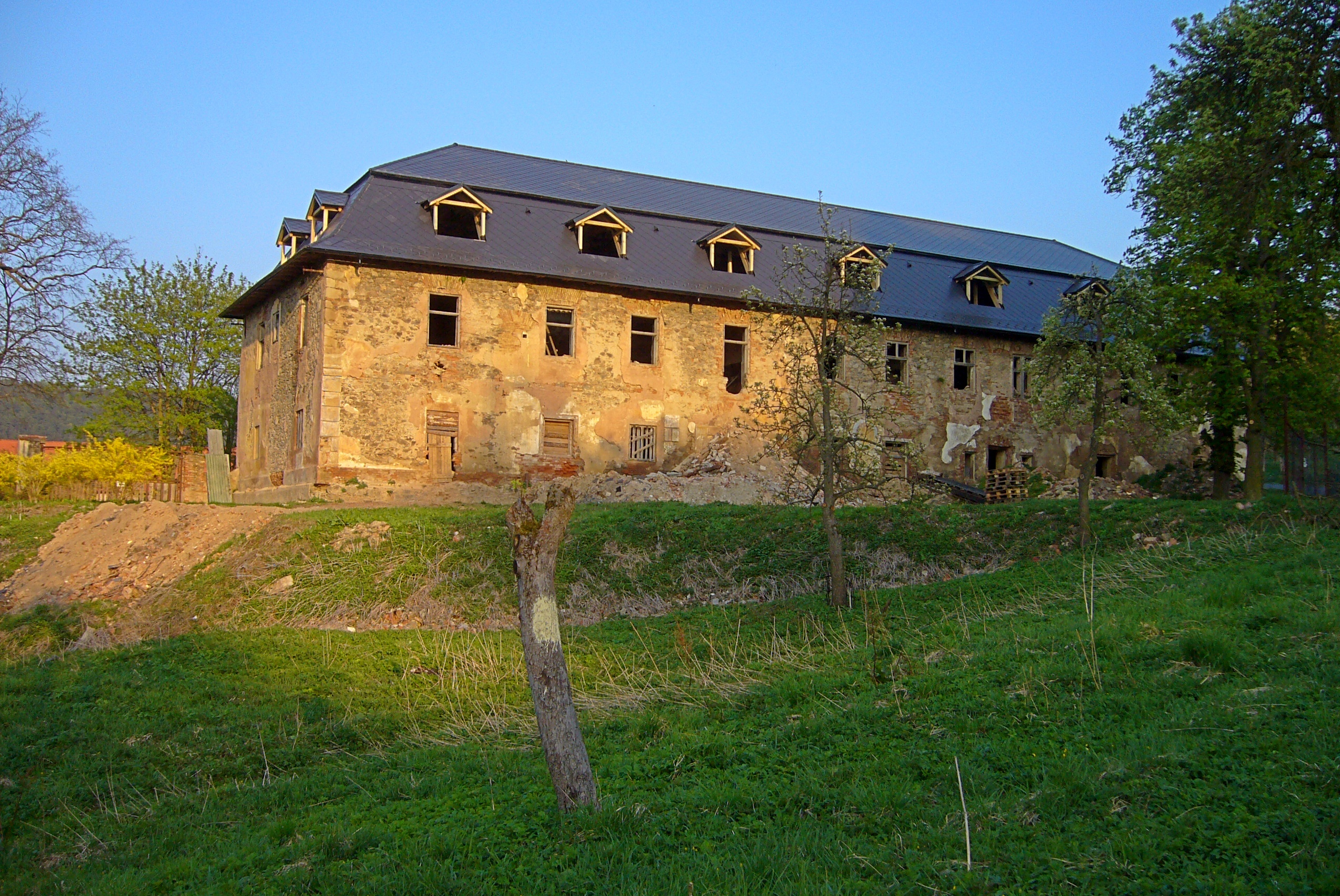 Stav zámecké budovy v roce 2011